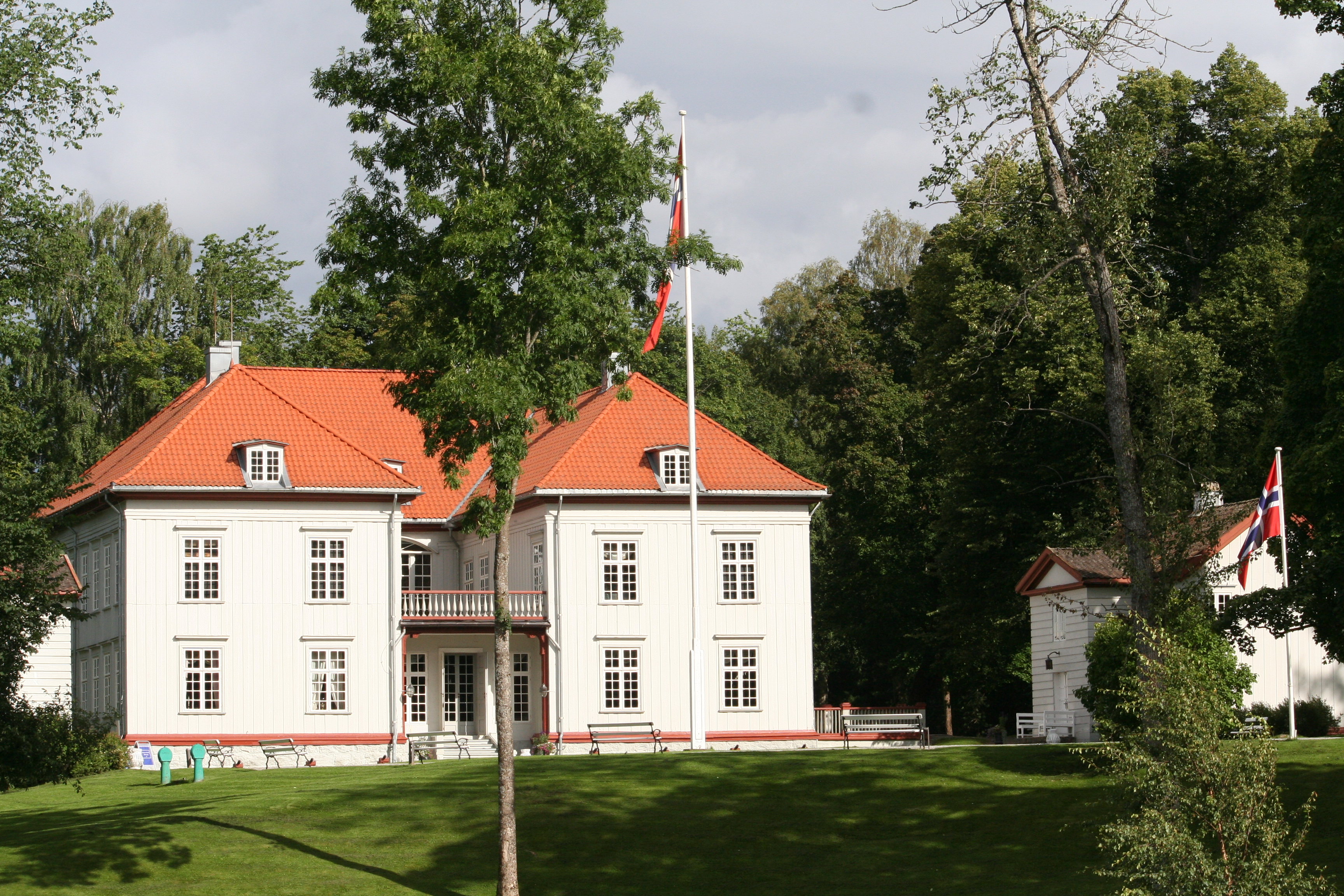 Foto: Kjersti Almåsvold